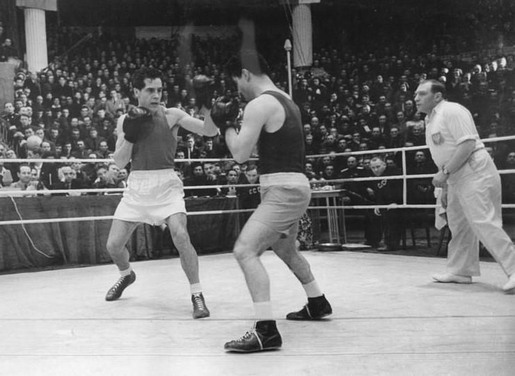 Boris Tischin, Laslo Papp Zentralbild XIII 6.5.1952 Internationales Länderturnier der Amateurboxer in Moskau vom 7.-15.März 1952. Im Moskauer Staatlichen Zirkus fanden die internationalen Freundschaftswettkämpfe von Amateurboxern aus 7 Ländern statt. Im Ring trafen sich die Mannschaften der UdSSR, der CSR, Ungarn, Bulgarien, Polens, Rumäniens und der Deutschen Demokratischen Republik.Das Treffen der sowjetischen und ungarischen Sportler endete mit 9:1 für die sowjetische Mannschaft. UBz: Links Boris Tischin (UdSSR), rechts Laslo Papp (Ungarn), der Sieger in diesem Kampf.